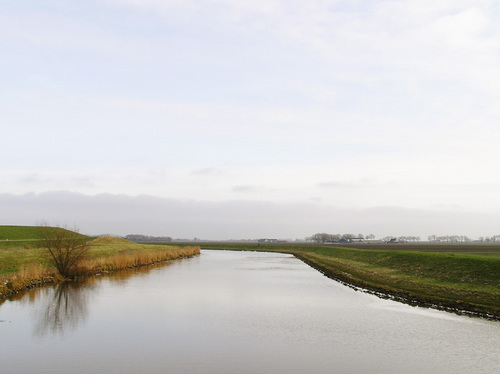 Carel Coenraadpolder, N-E-Groningen